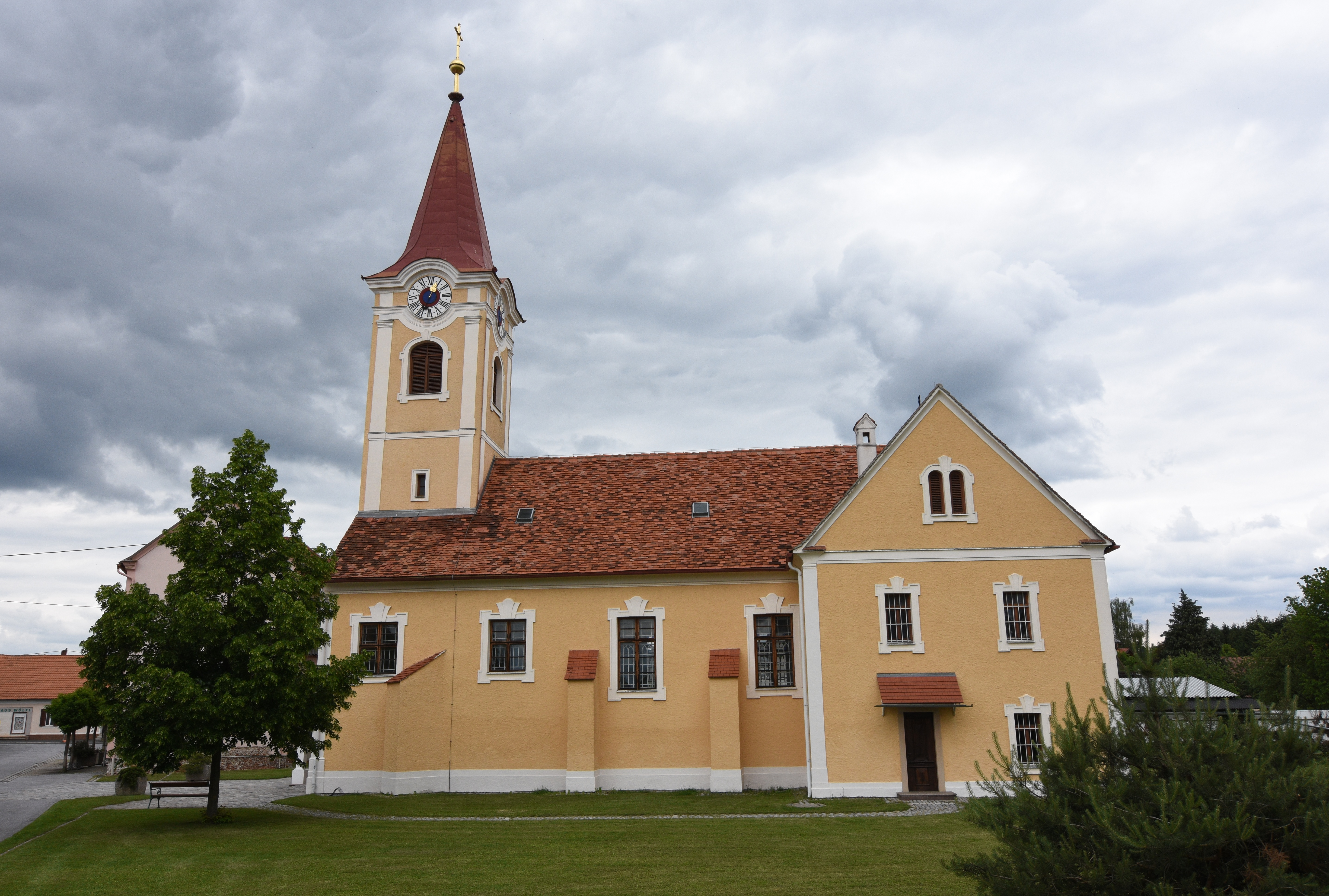 Pfarrkirche Wörth an der Lafnitz